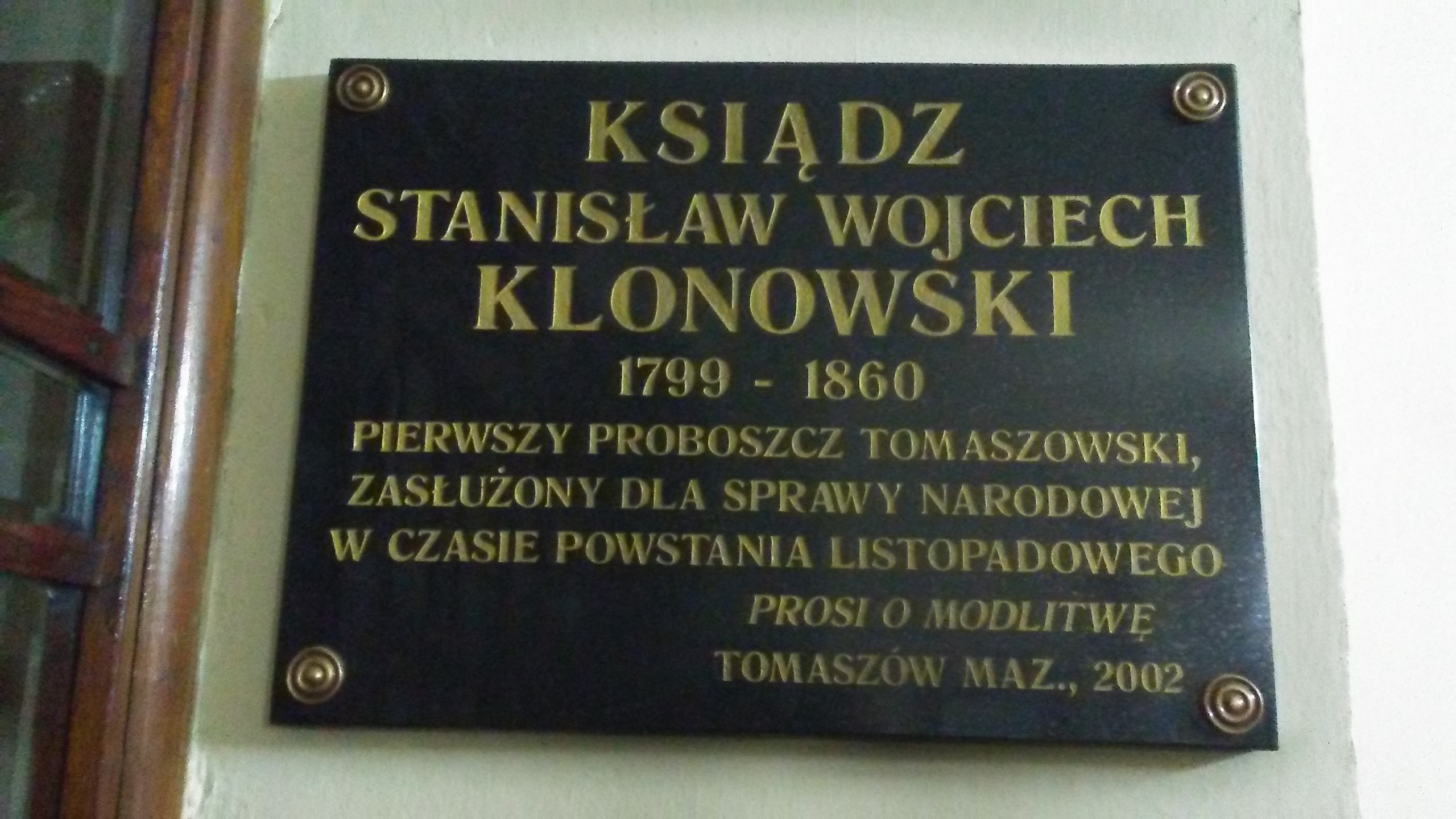 Ksiądz Stanisław Wojciech Klonowski (1799-1860), pierwszy proboszcz parafii św. Antoniego w Tomaszowie Mazowieckim. Tablica pamiątkowa w kruchcie kościoła pw. św. Antoniego w Tomaszowie